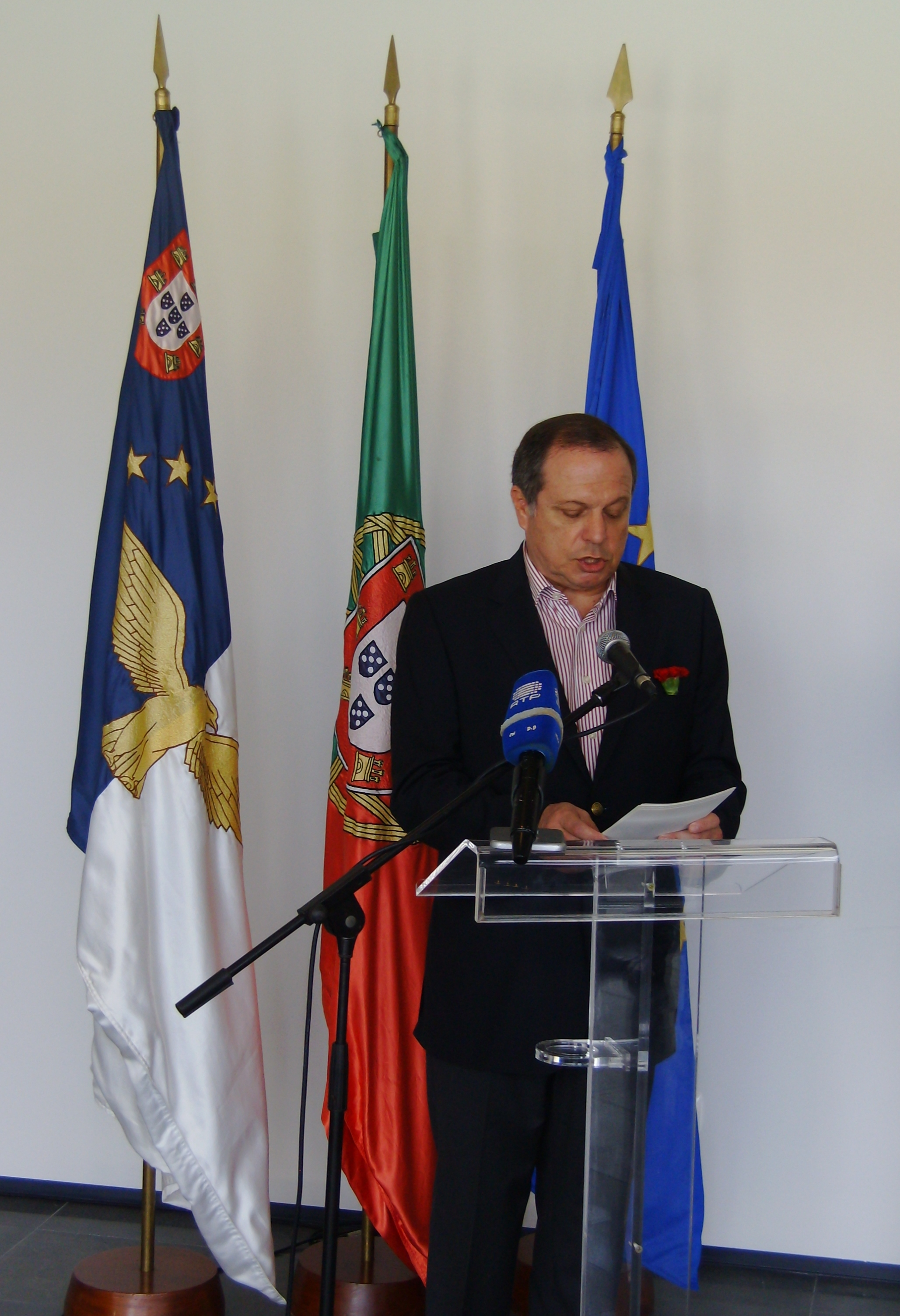 Carlos Manuel Martins do Vale César, na qualidade de Presidente do Governo Regional dos Açores, discursa na cerimónia de inauguração da Pousada da Juventude de Vila do Porto, ilha de Santa Maria, Açores.